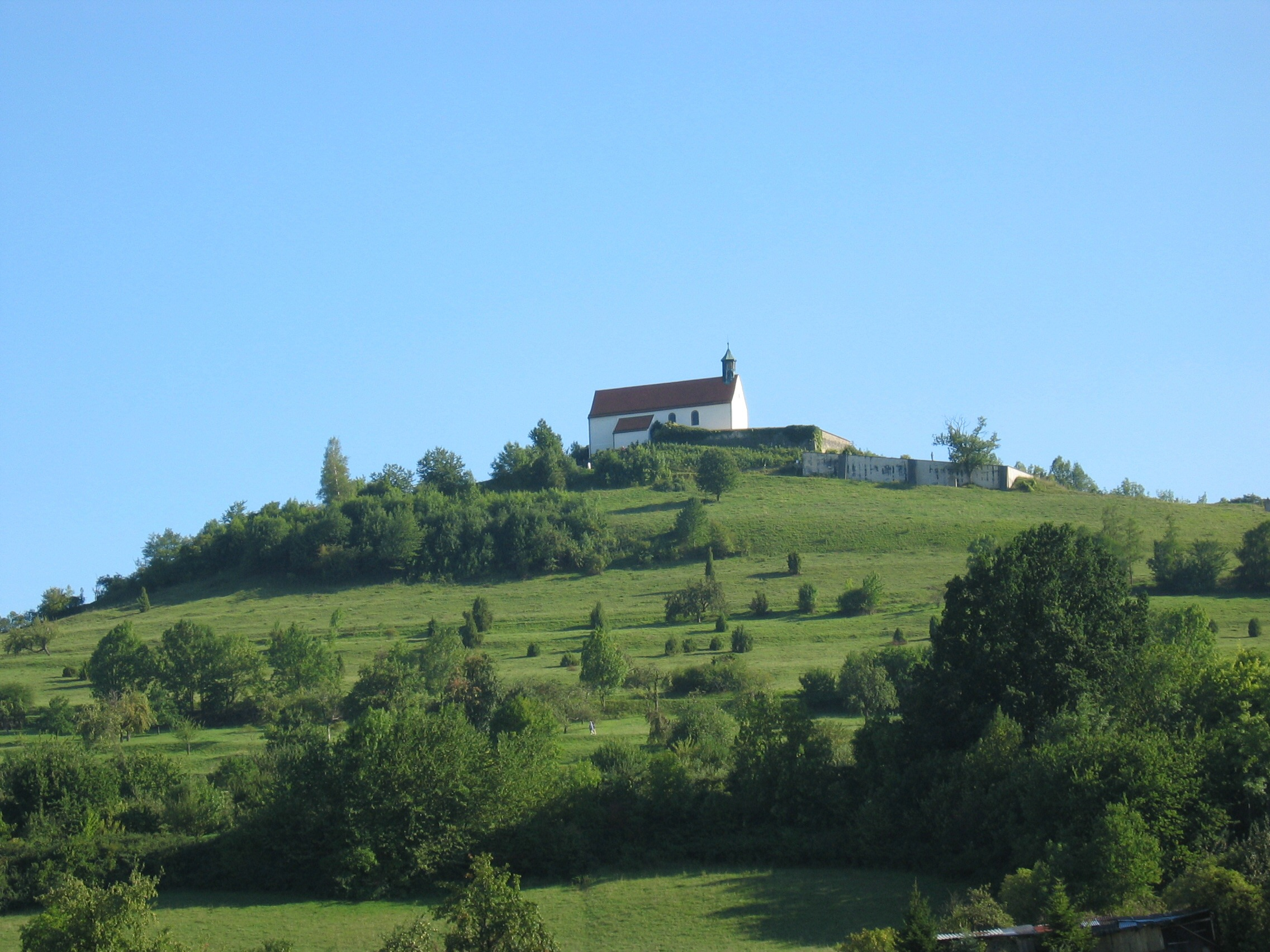 Wurmlinger Kapelle Fotograf: Karsten Weiss Andere Versionen